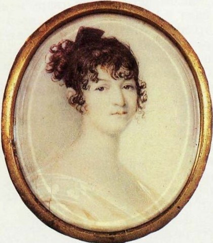 Надежда Осиповна Пушкина, урожд. Ганнибал (1775—1836), мать поэта А. С. Пушкина. Художник Ксавье де Местр. 1810